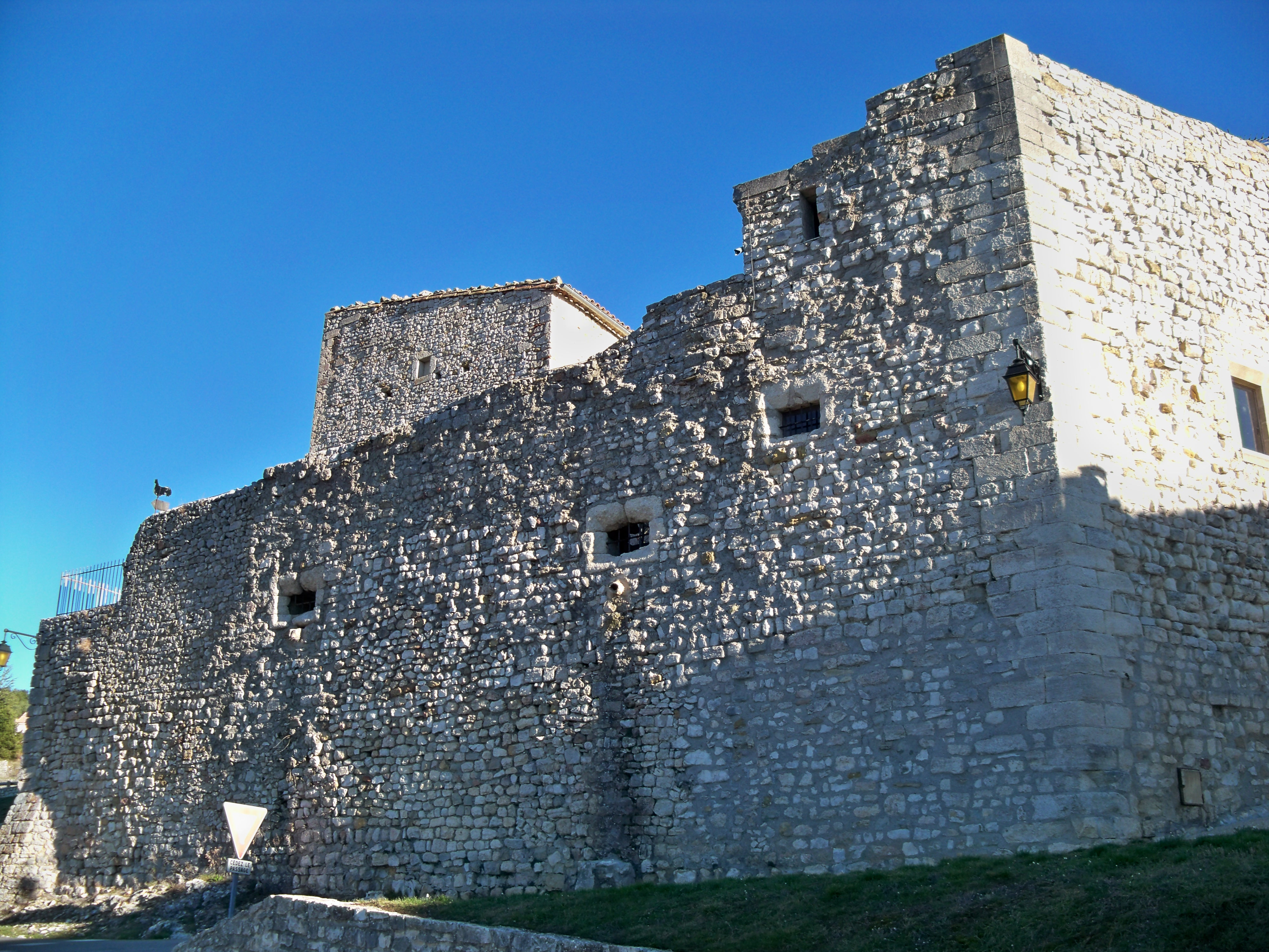 Anciens remprts d'Aurel (Vaucluse), au niveau du Chateau